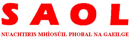 lógó, Saol